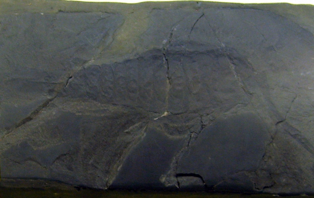 Erettopterus bilobus at the Museum für Naturkunde, Berlin.